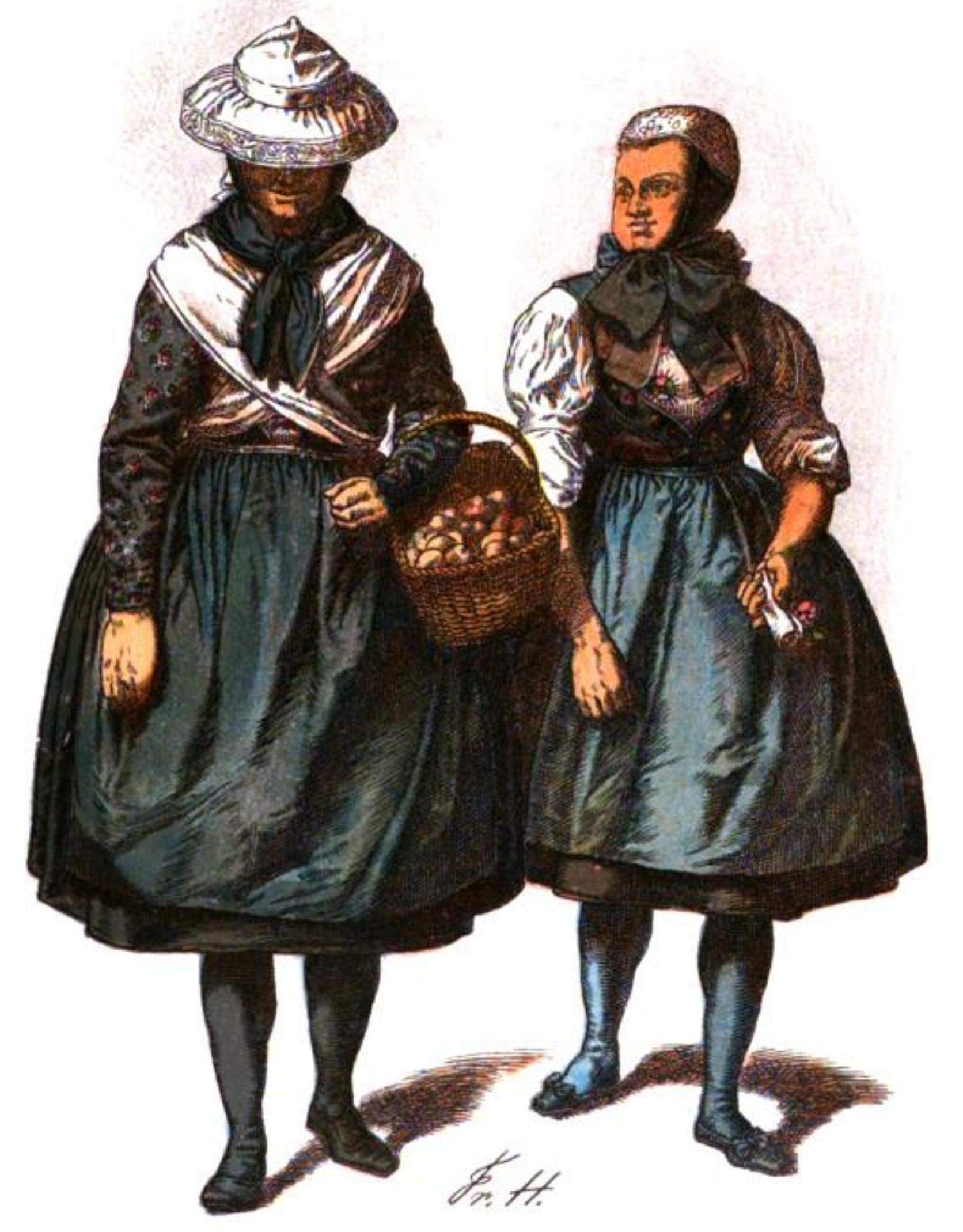 Friedrich Hottenroth: Nassauisches Trachtenbuch Tafel 5: Bäuerinnen aus der Gegend von Dornassenheim Ober- und Niederkleen